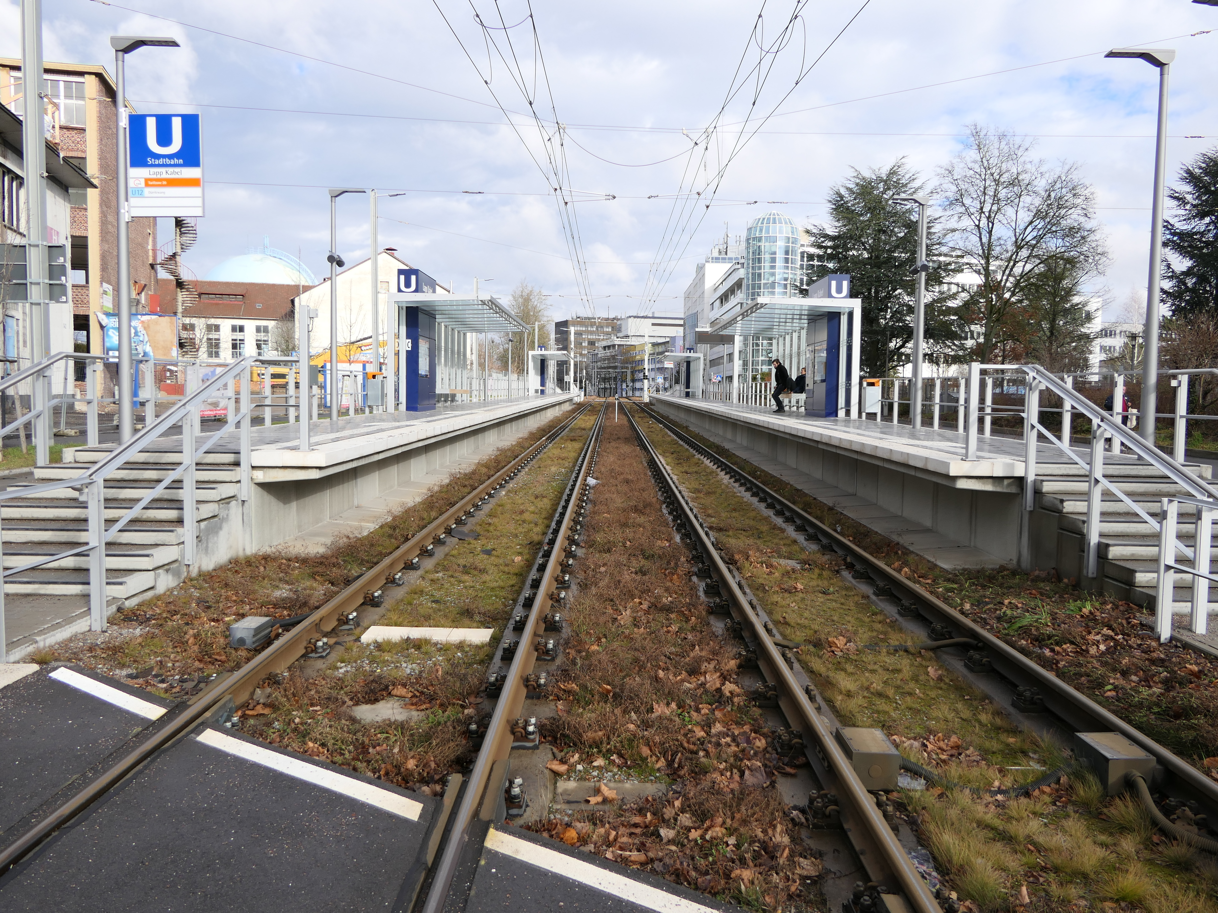 Die Stadtbahnhaltestelle Lapp Kabel in Stuttgart.